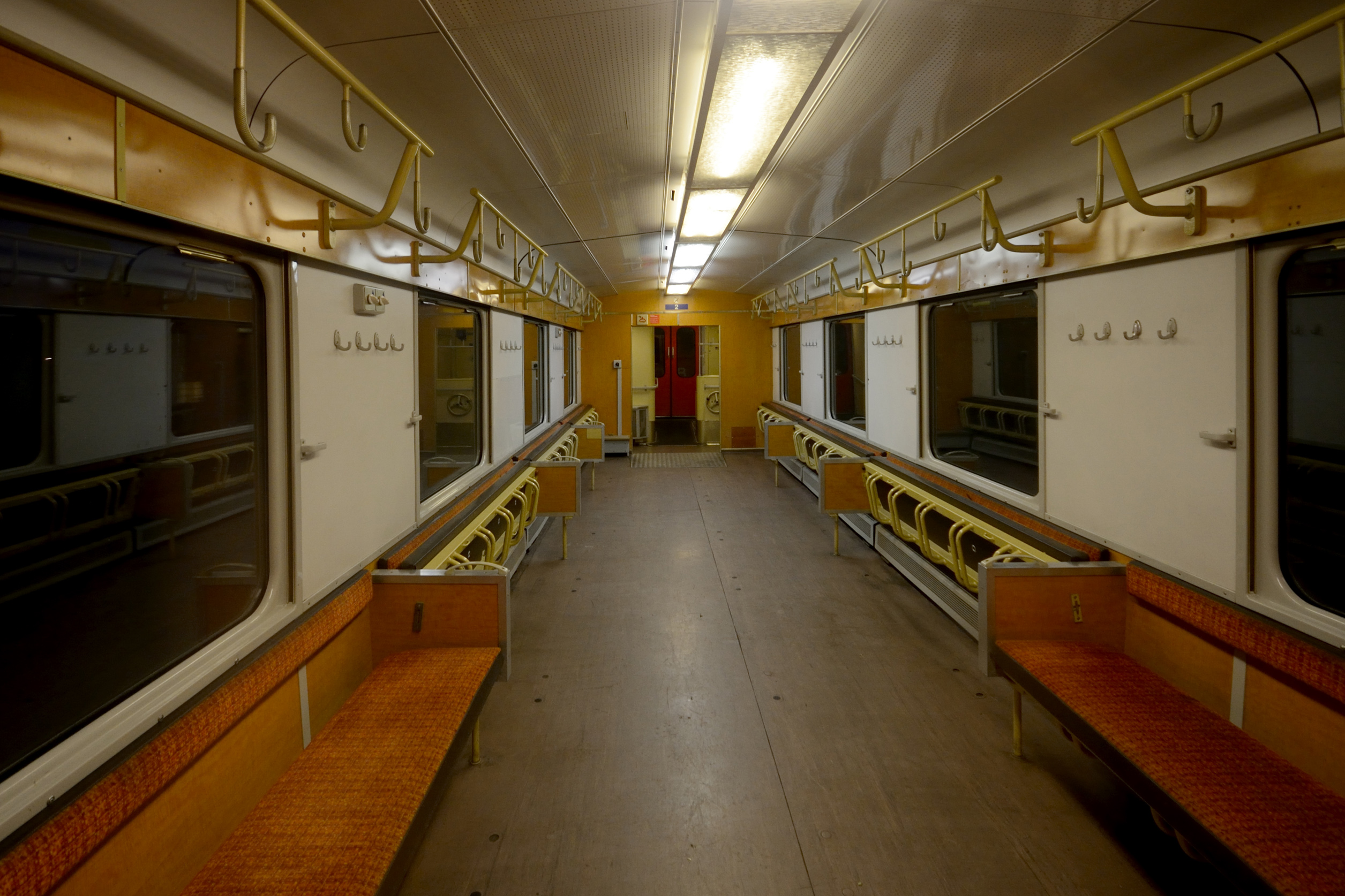 Mehrzweckabteil eines ÖBB-Schlierenwagens